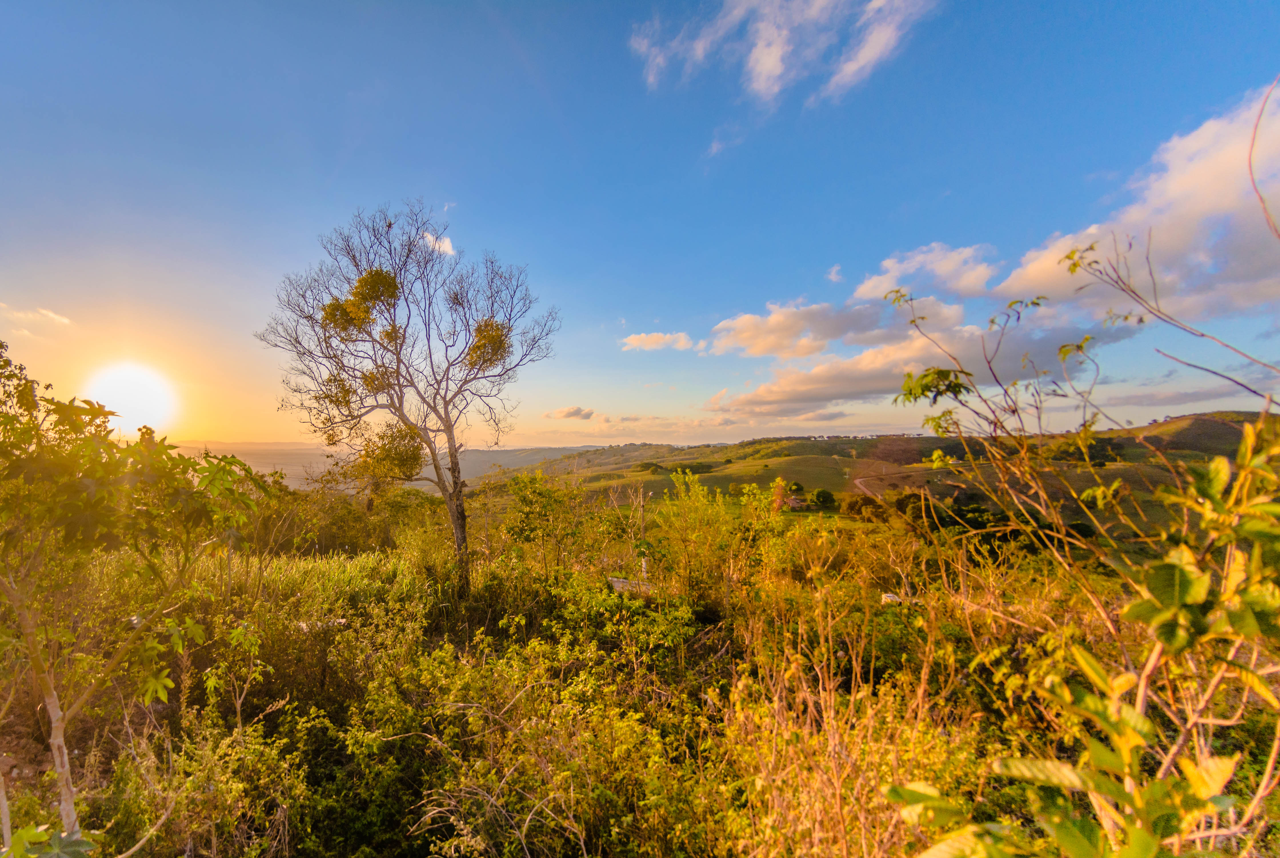 Visão do pôr do sol no Cristo.